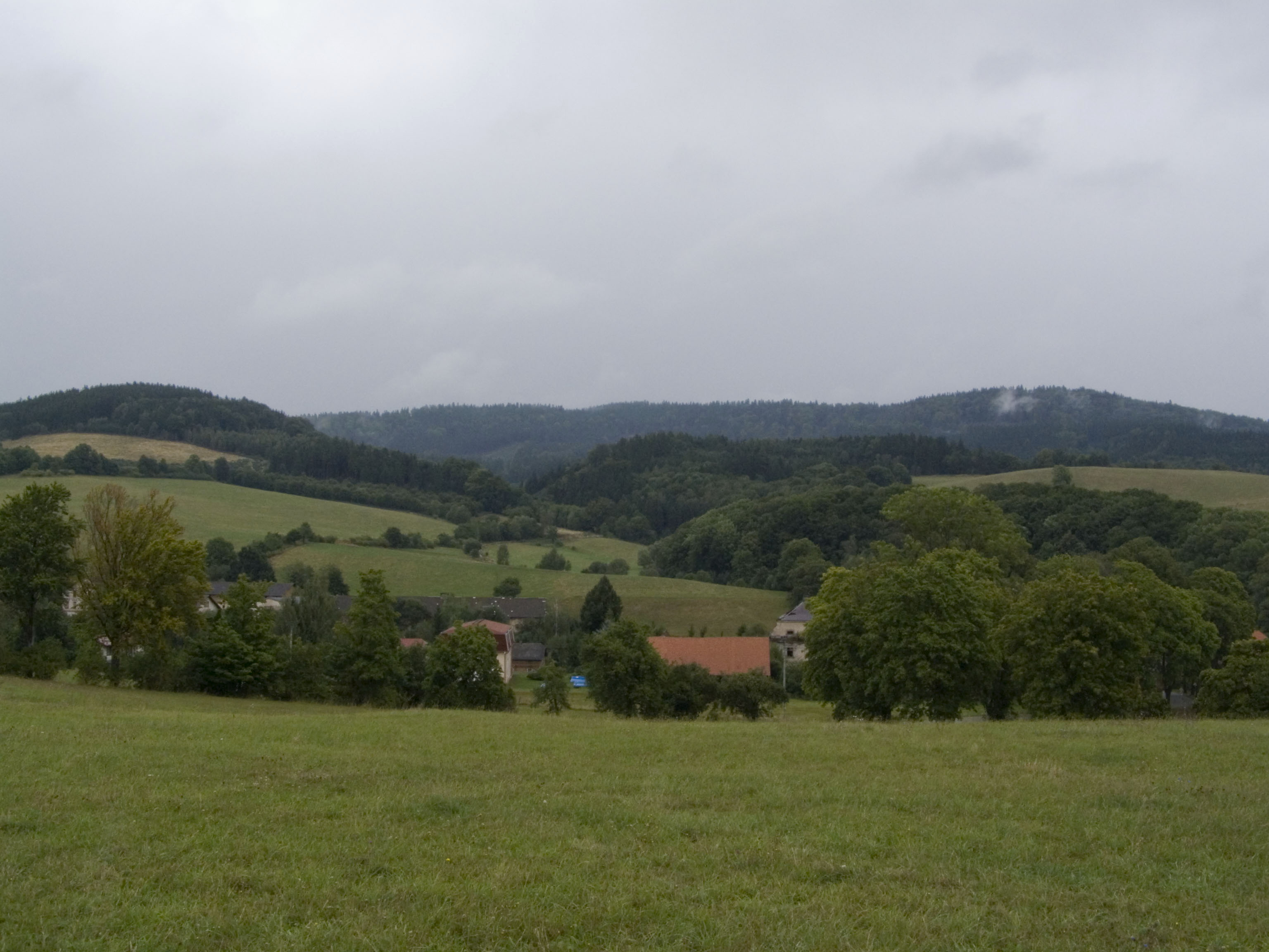 Šonov, v pozadí Javoří hory